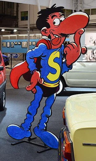 Exposició Vinyetes sobre rodes al 34è Saló Internacional del Còmic de Barcelona. Detall de Super Llopis al costat d'un SEAT Panda 40 de color vermell.